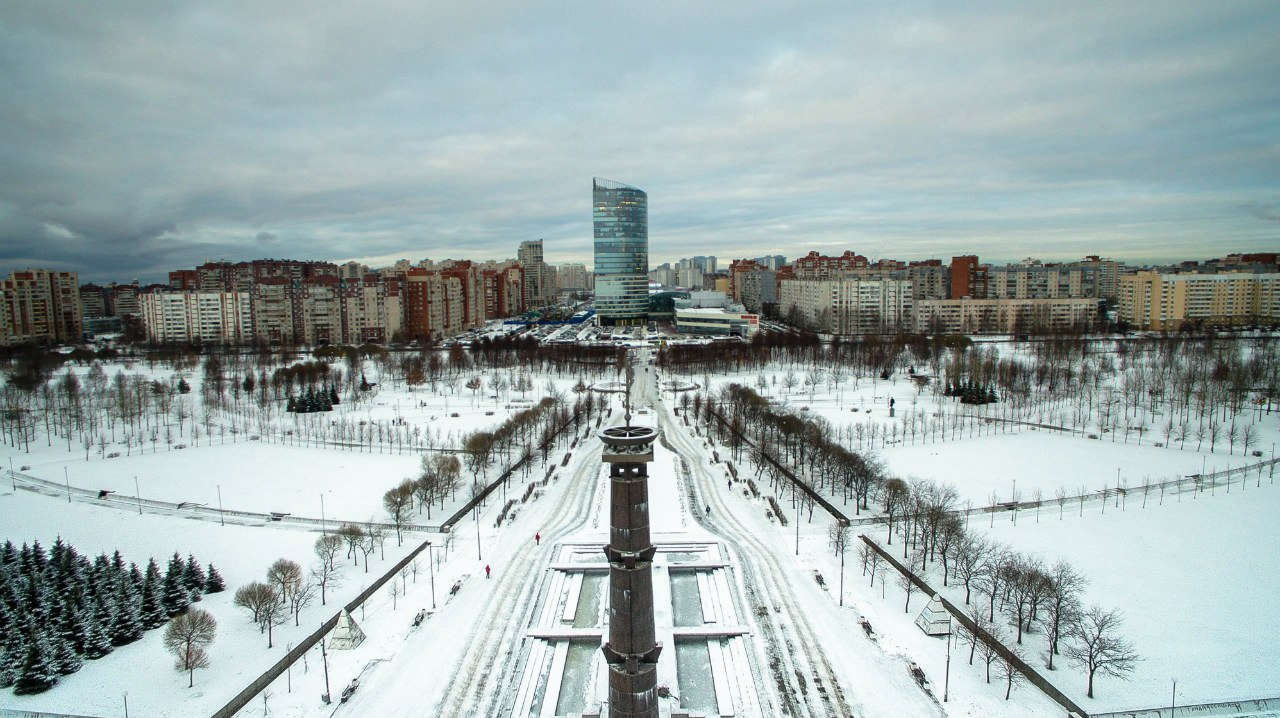 Парк зимой 2016 года